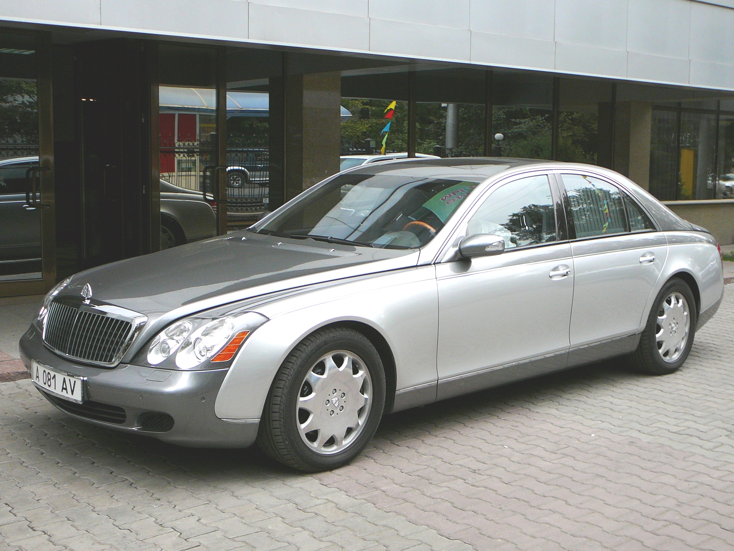 Майбах в Алма-Ате. Госномер A081AV